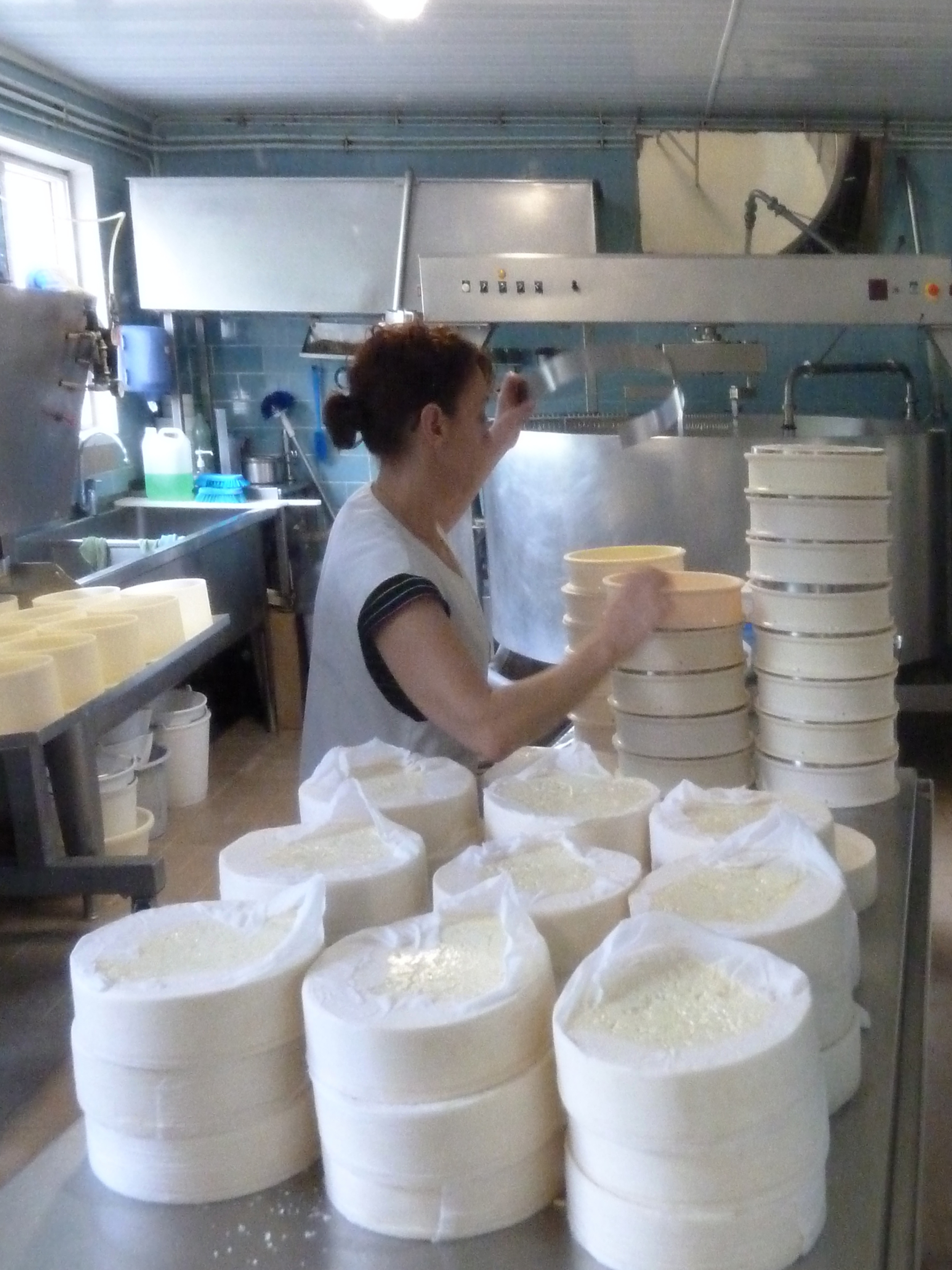 Dans une ferme de Saint-Nectaire pour la fabrication du Fromage .- Monts Dore Puy-de-Dôme.- France